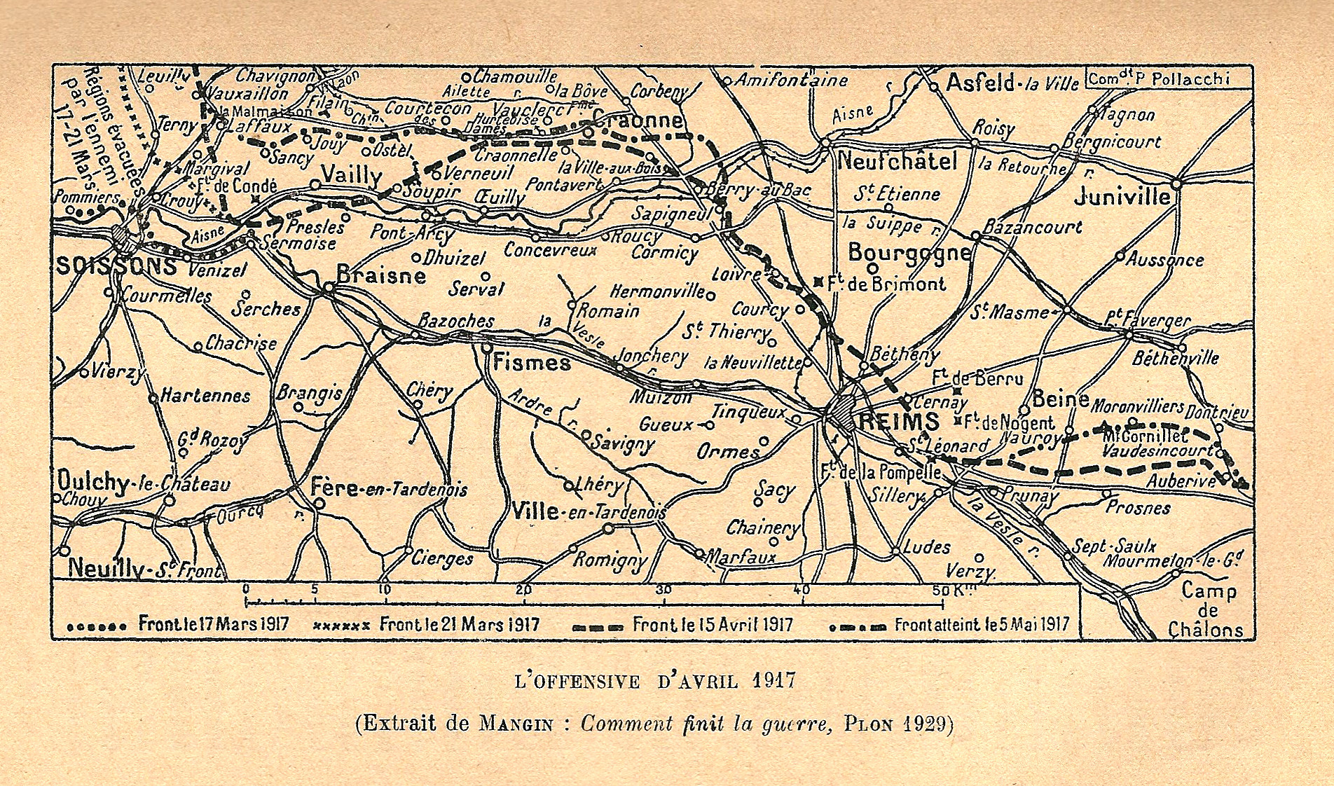 Charles Mangin (1866-1925) ; plan offensive du Chemin des Dames